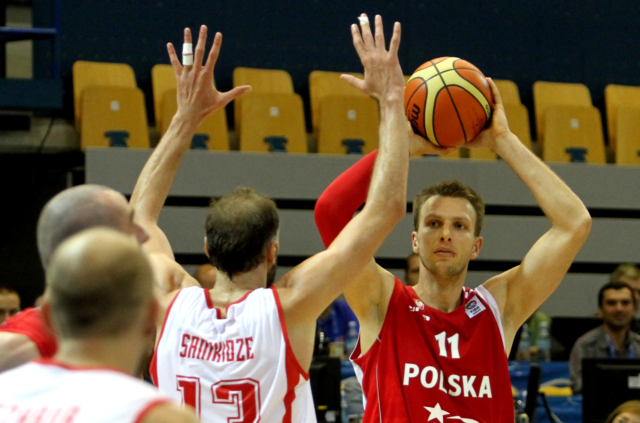 Reprezentacja Polski koszykarzy z 2013 roku. Michał Ignerski